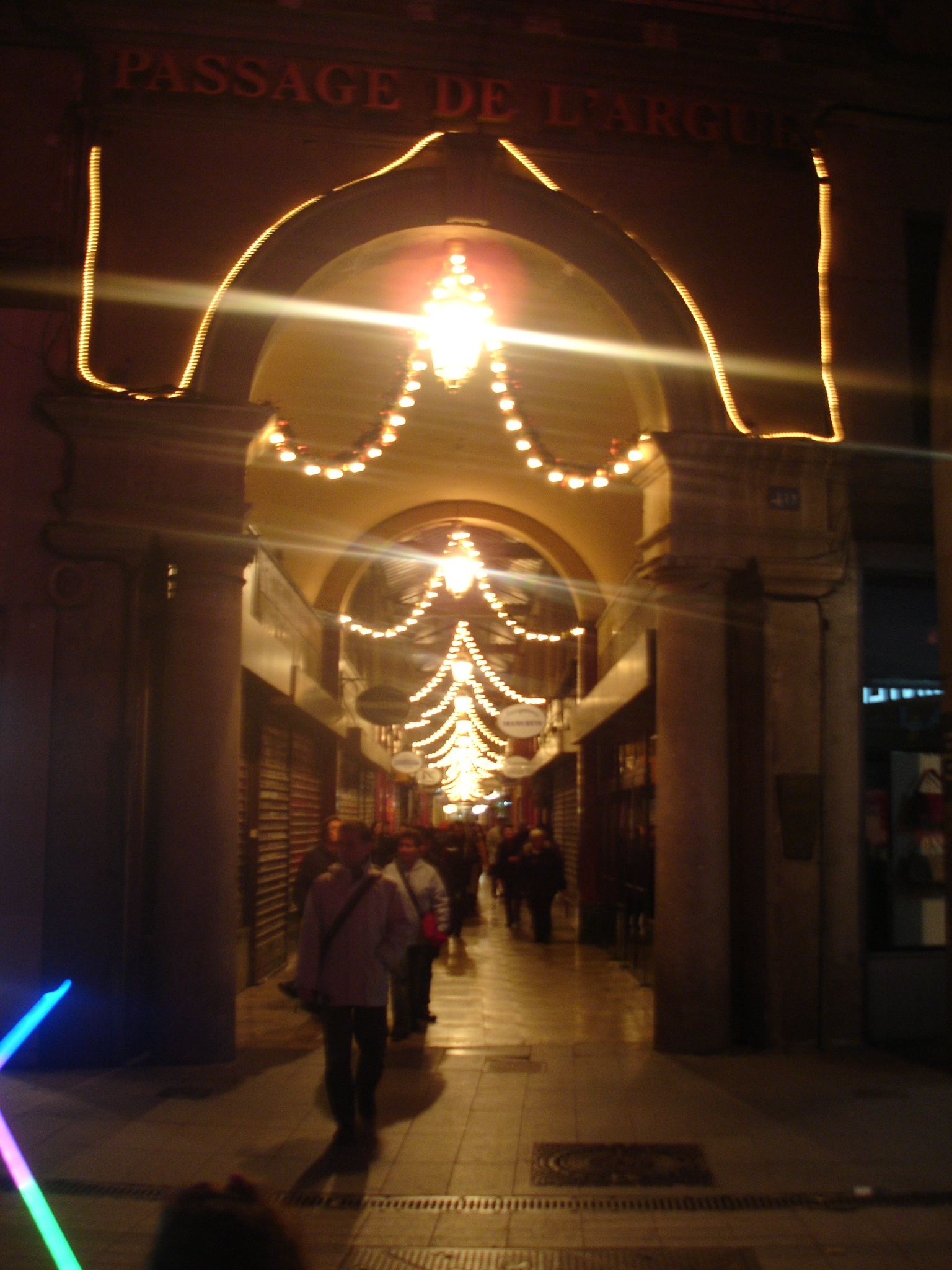 Lyon Presqu'île : le passage de l'Argue le 8 décembre 2009